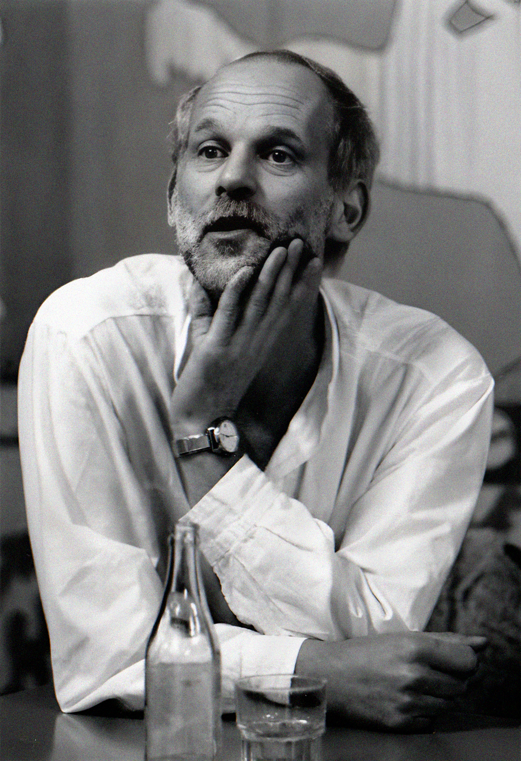 Ebbe Gilbe. Malmö 1987.